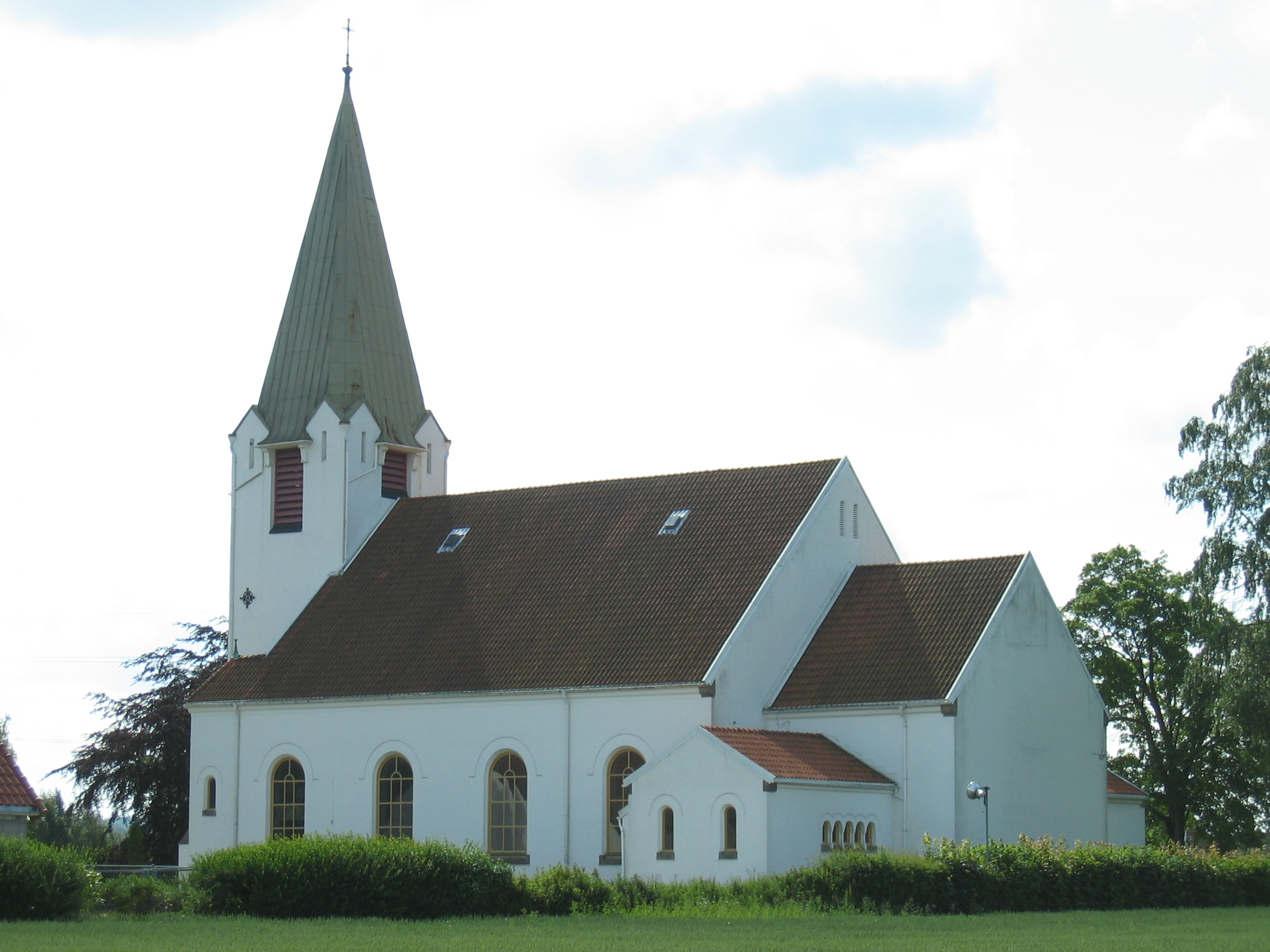 Rolvsøy kirke, Fredrikstad, Østfold, Norway. Picture taken by PerPlex 25 June 2006.